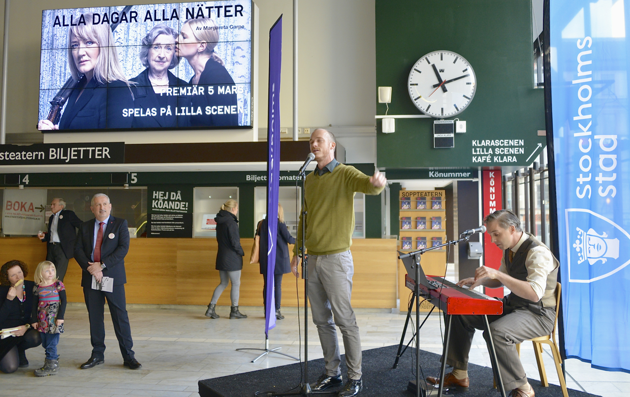 Albin Flinkas och Fredrik Meyer under öppet hus på Kulturhuset Stadsteatern i Stockholm i samband med 40-årsfirandet den 29 november 2014.